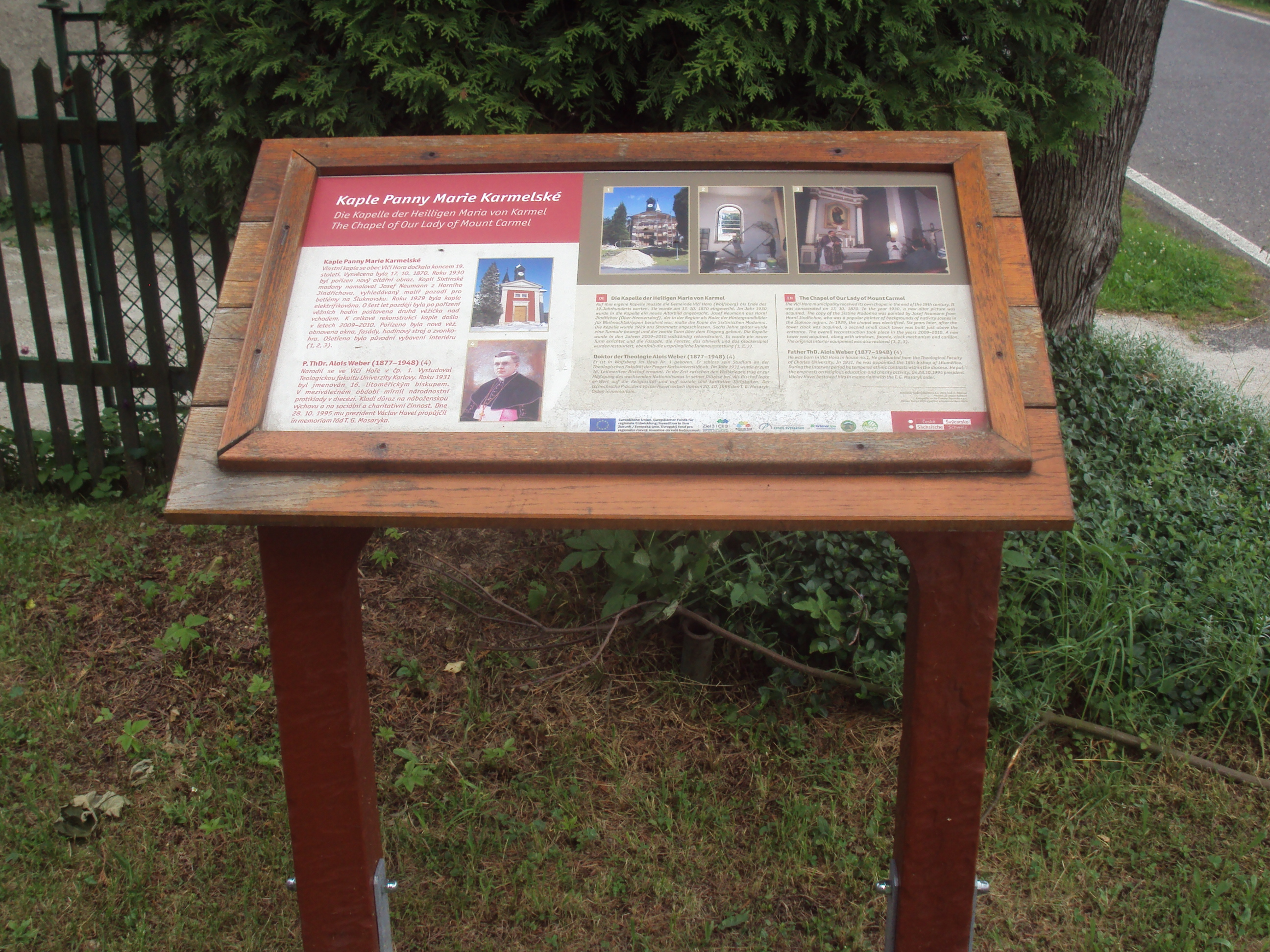 Tabule Vlčí Hora, prý kostel je kaple